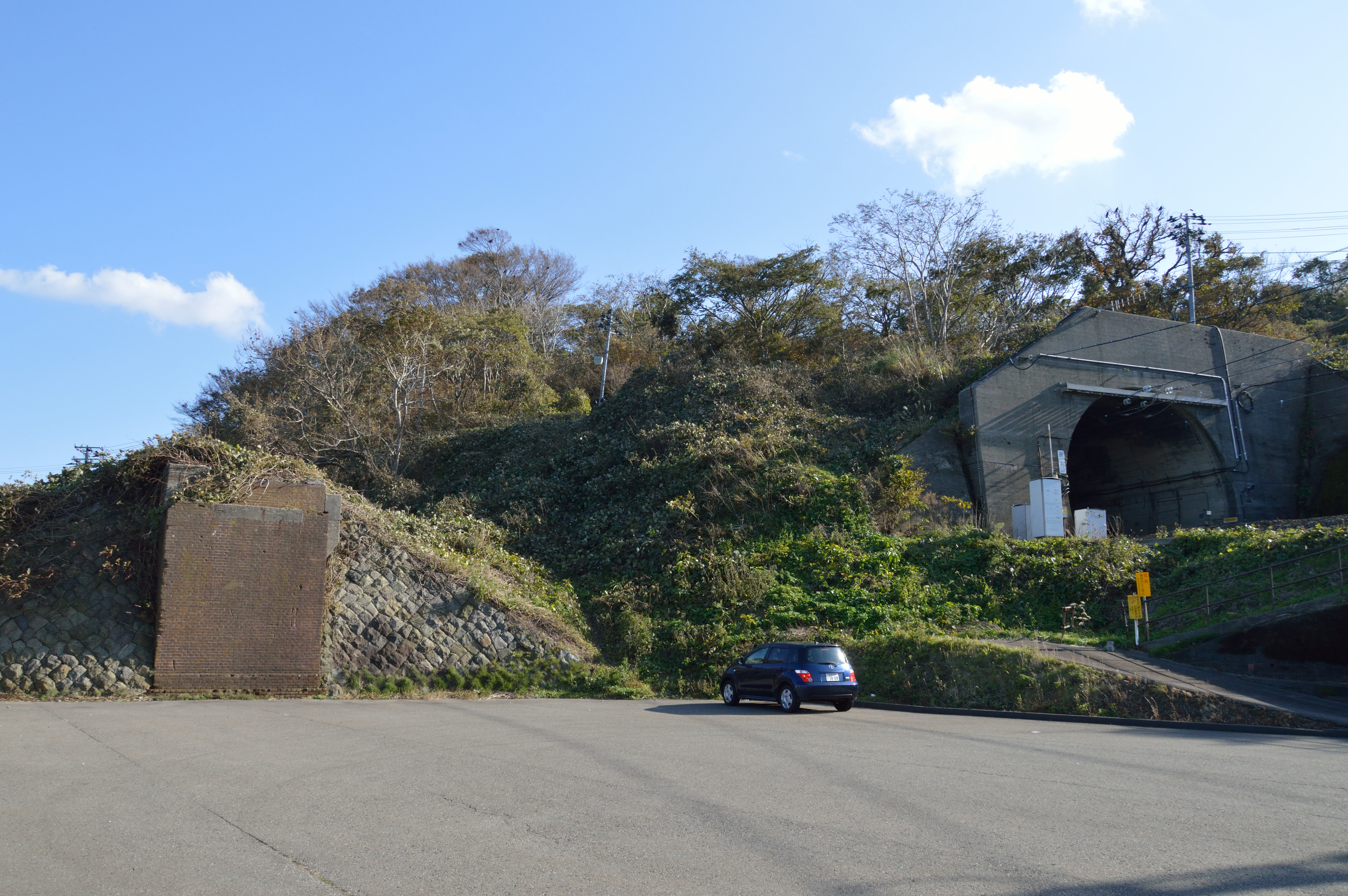 えちごトキめき鉄道日本海ひすいライン(旧北陸本線)谷浜 - 有間川間 新線の長浜トンネルと旧線の橋台